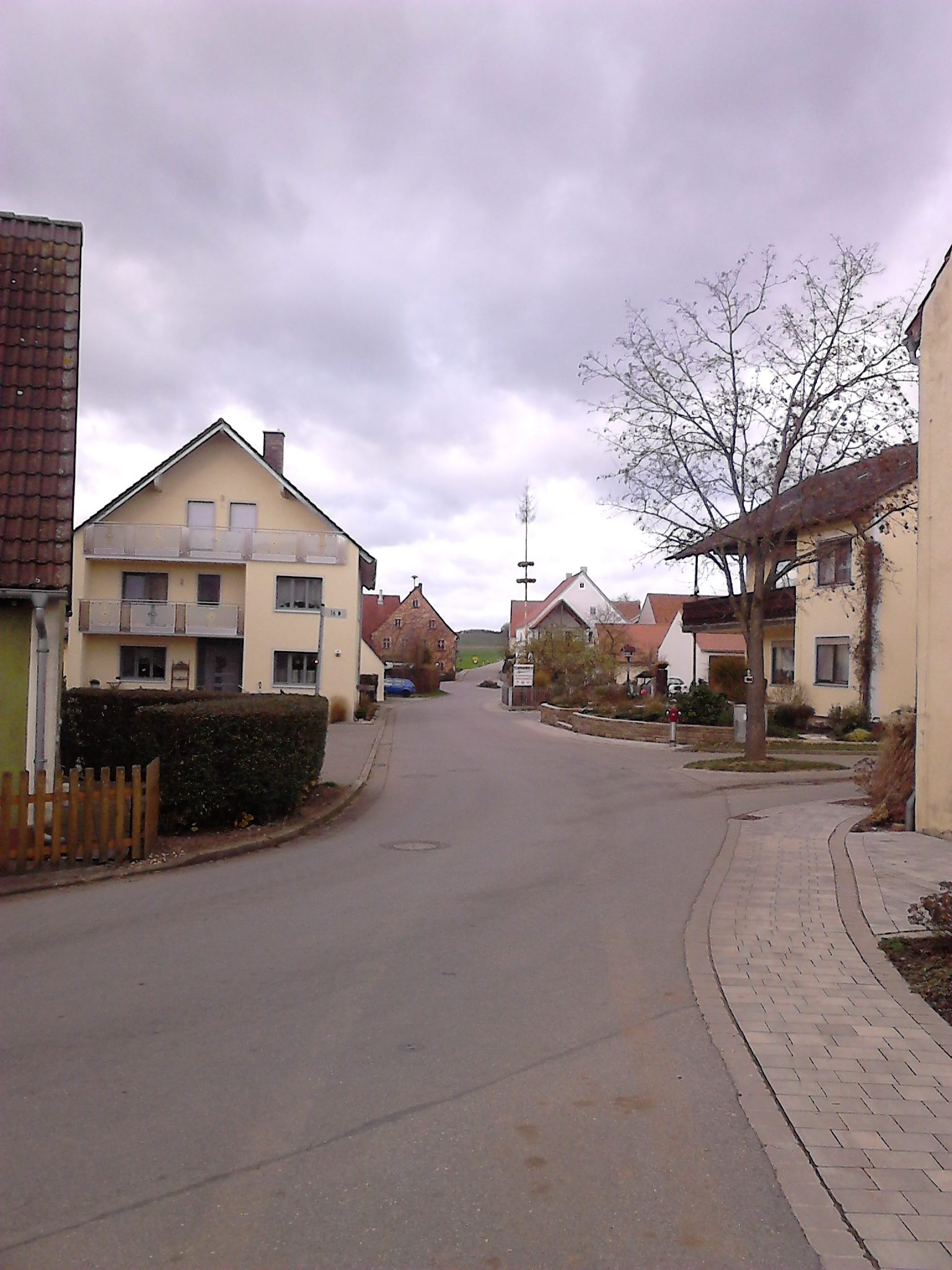 Straße in Gundelshalm